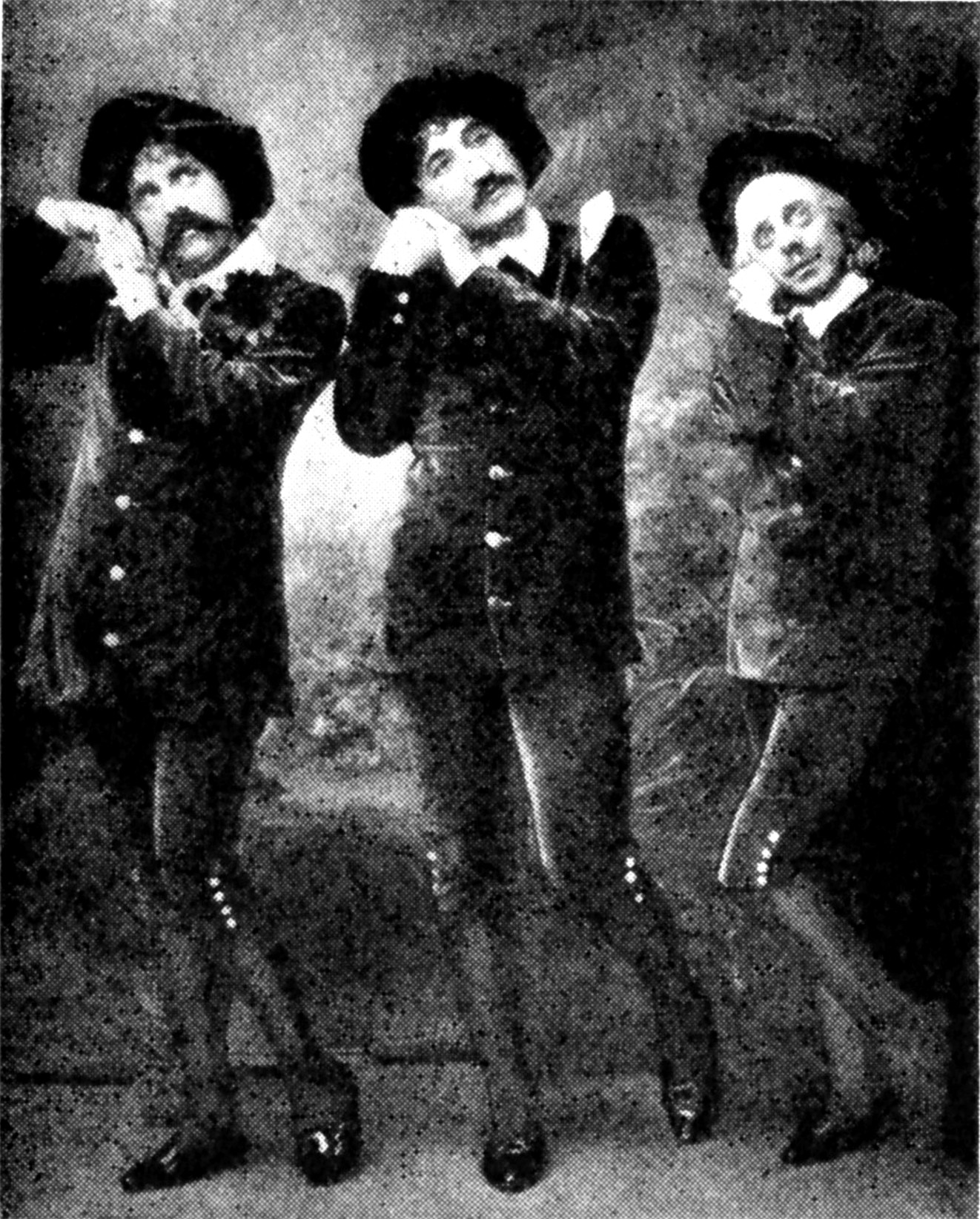 Drei Dragoner, die in der Operette "Patience" versuchen, die effeminierten Ästheten-Posen zu kopieren, um ihre Verlobten zu beeindrucken.